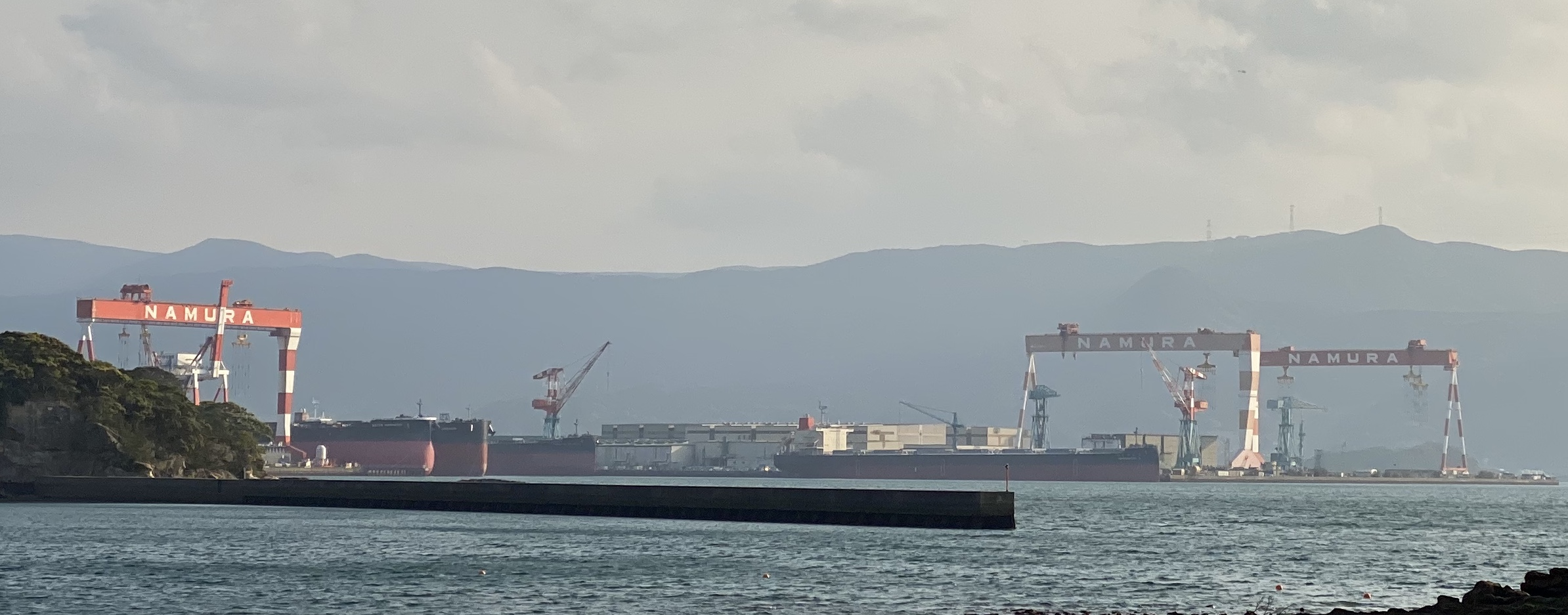 イマリンビーチにて2020年4月25日撮影